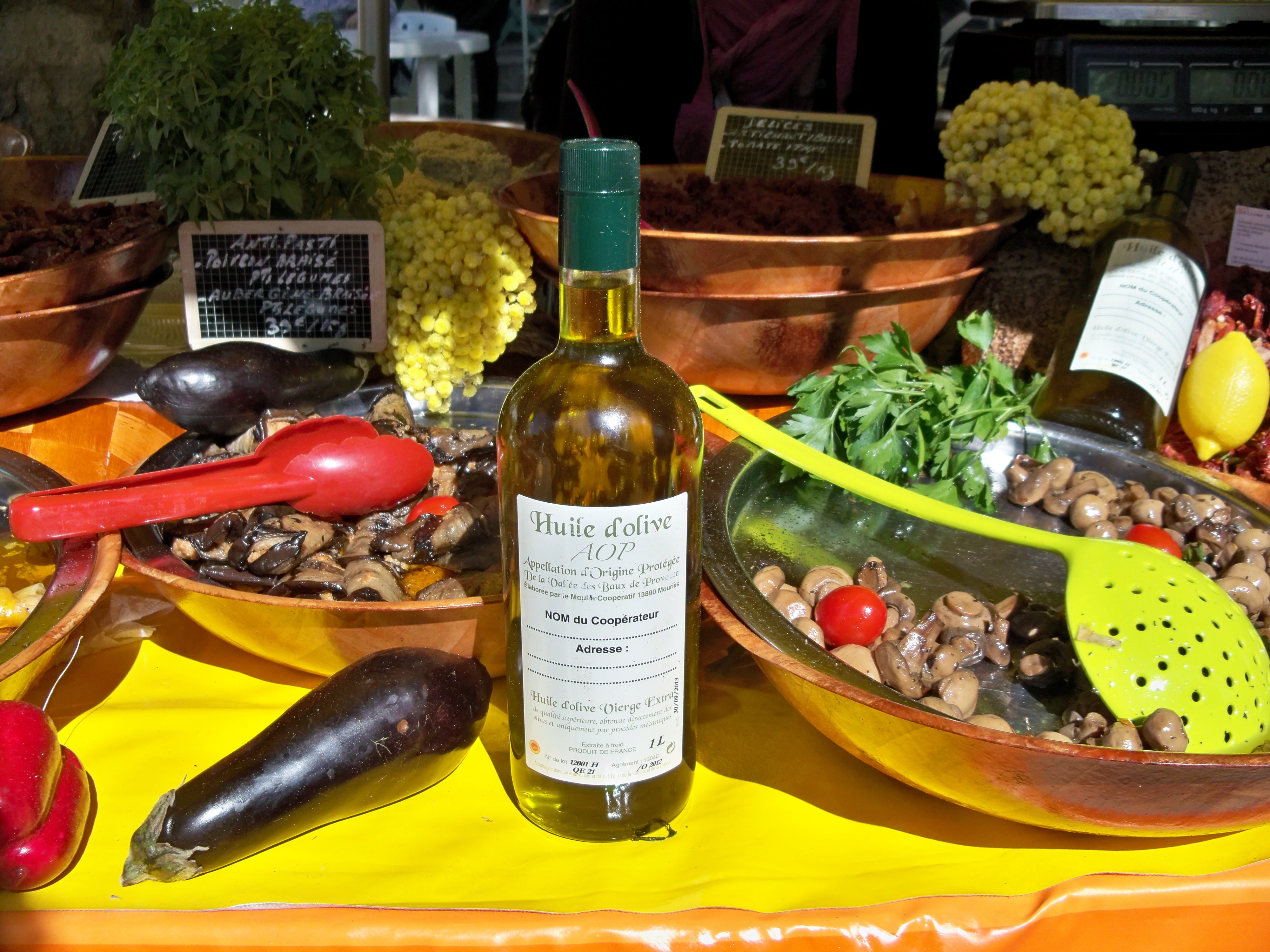 bouteille d'huile d'olive des Baux de Provence AOP